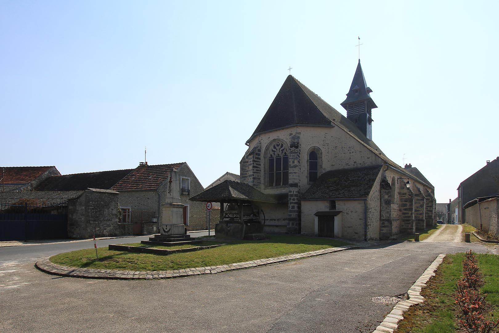 église de La Foret Sainte Croix